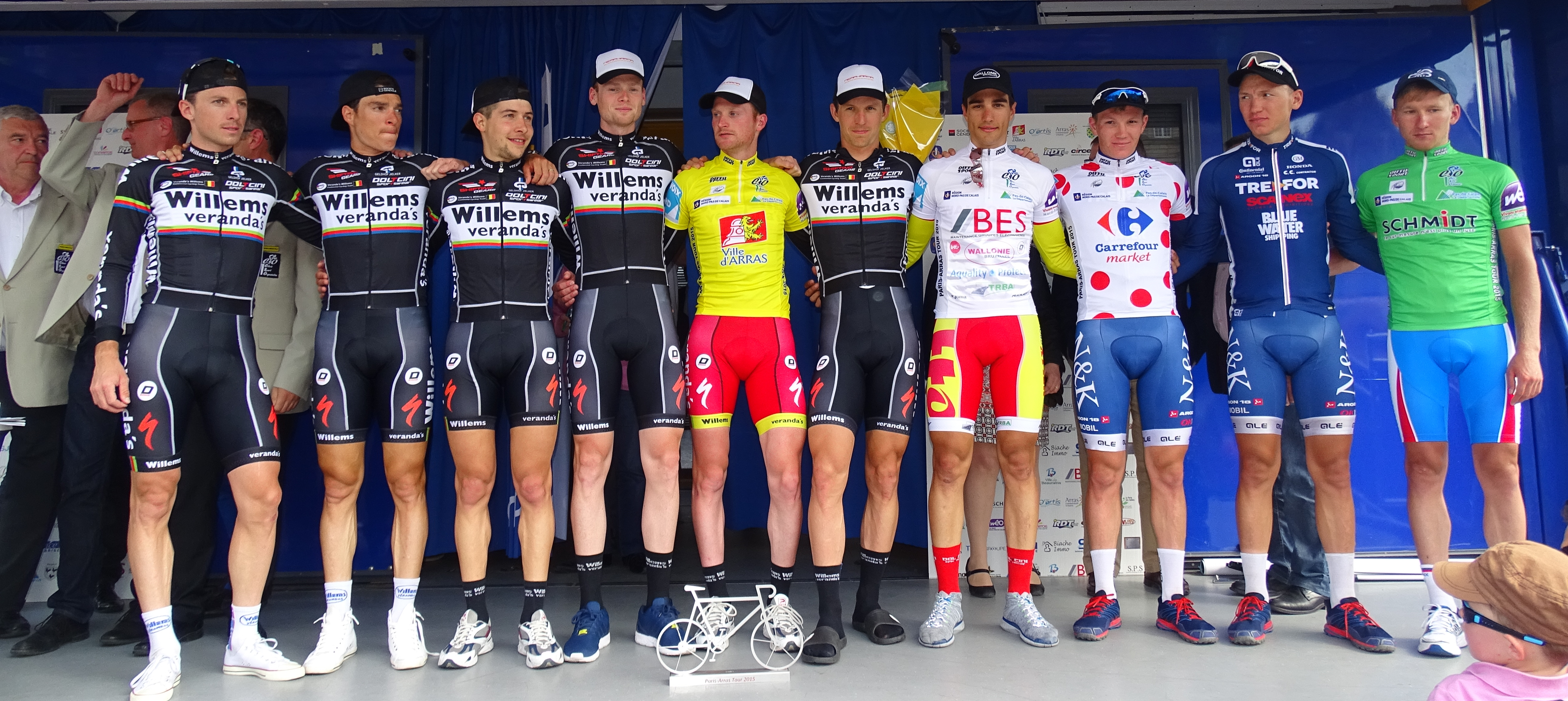 Reportage réalisé le dimanche 24 mai 2015 à l'occasion du départ et de l'arrivée de la troisième étape du Paris-Arras Tour 2015 à Arras, Pas-de-Calais, Nord-Pas-de-Calais, France. Depicted people: Gaëtan Bille, Olivier Pardini, Christophe Prémont, Stef Van Zummeren, Joeri Calleeuw, Dimitri Claeys, Antoine Warnier, Søren Kragh Andersen, Asbjørn Kragh Andersen and Sergey Vdovin Depicted team: Verandas Willems, Wallonie-Bruxelles, Trefor-Blue Water, Lokosphinx